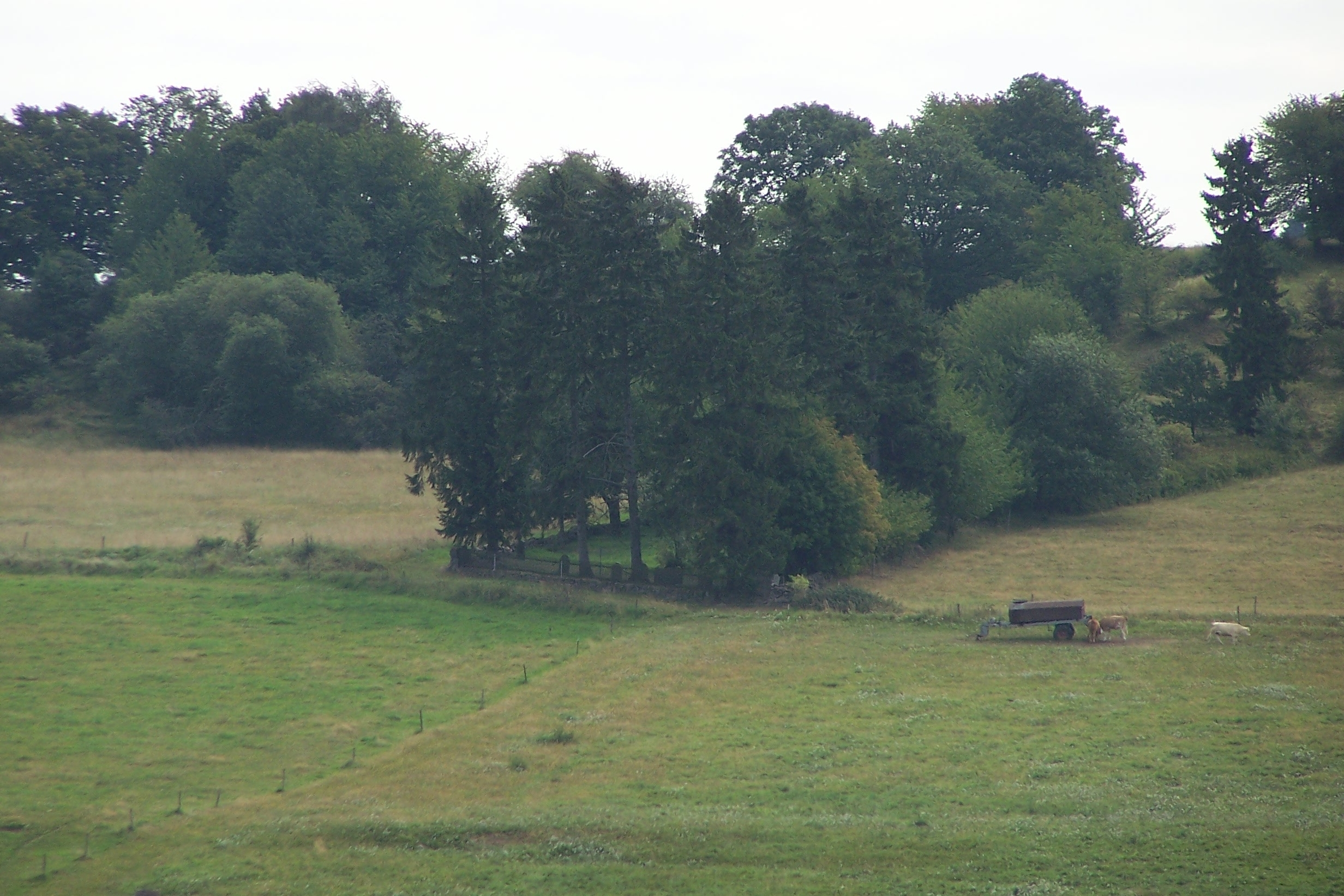 Blick zum jüdischen Friedhof von Gehaus.